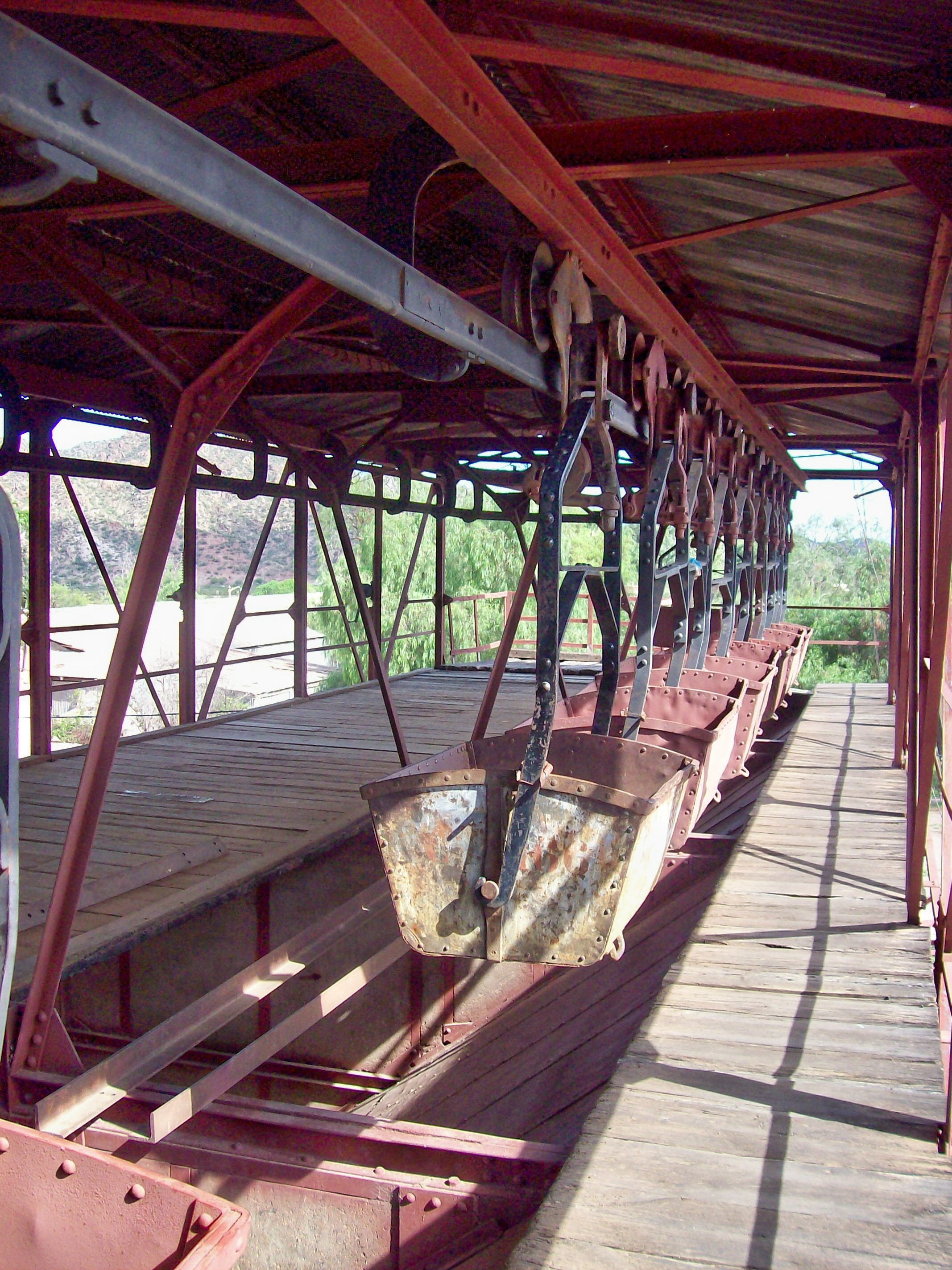 Vagonetas del Cablecarril Chilecito-La Mejicana, en Chilecito, en la provincia argentina de La Rioja, en la Estación nº 1 del cablcarril (hoy museo) , cerca de "Presidente Perón" y "Costa Rica". La foto está tomada mirando aproximadamente al SE.